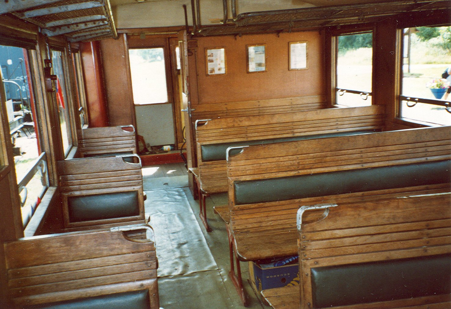 Blick in den Fahrgastraum eines M131.1